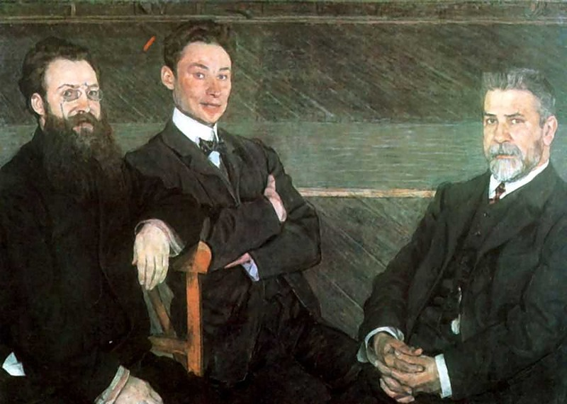 Головин Александр. Групповой портрет служащих петербургских Императорских театров (А.Б.Сальников, Л.В.Калинов, В.Д.Щеголев). 1906